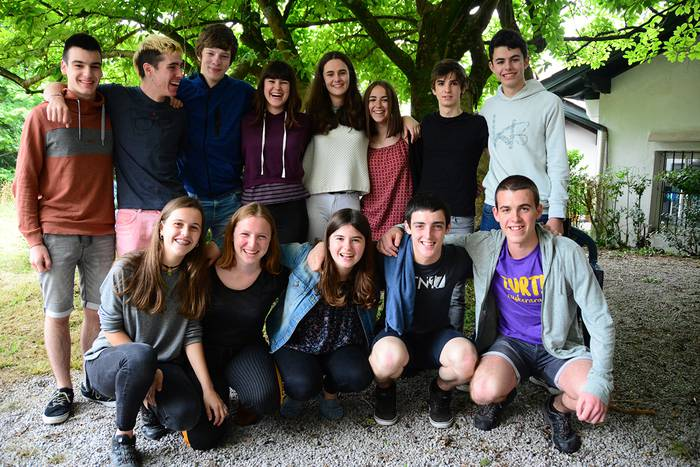 EH Eskolartekoa Saran